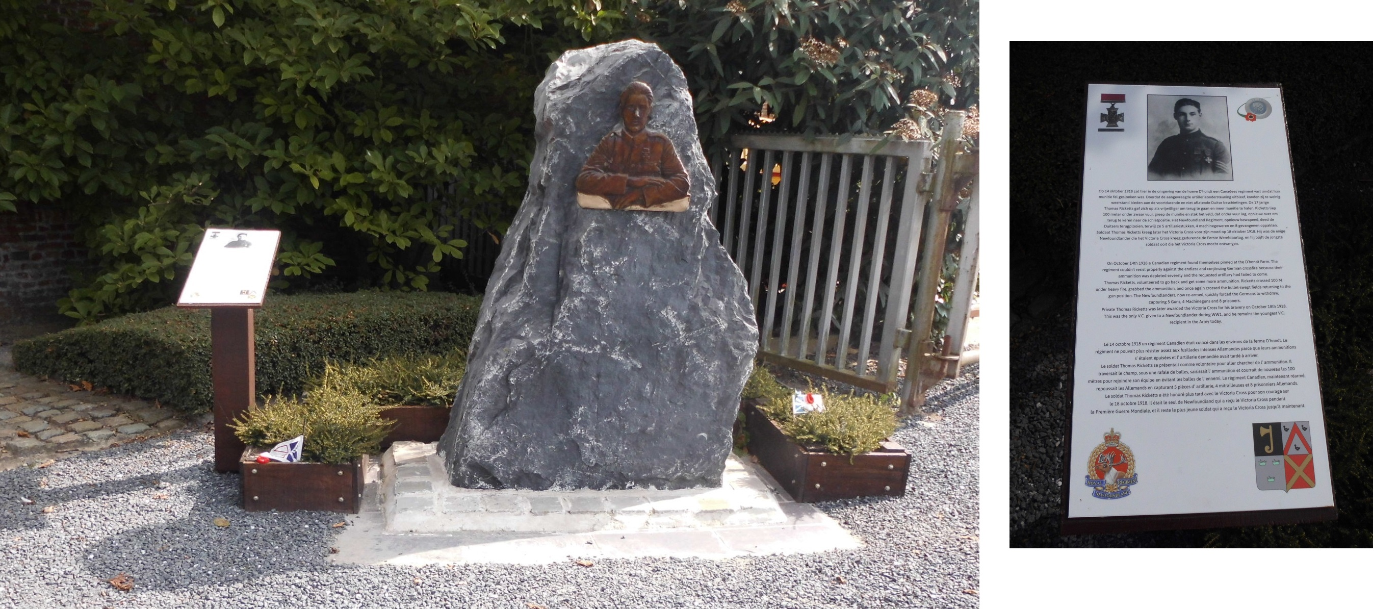 Thomas Rickettsmonument aan het Beurtepachthof - Gullegemsestraat - Sint-Eloois-Winkel - Ledegem - West-Vlaanderen - België